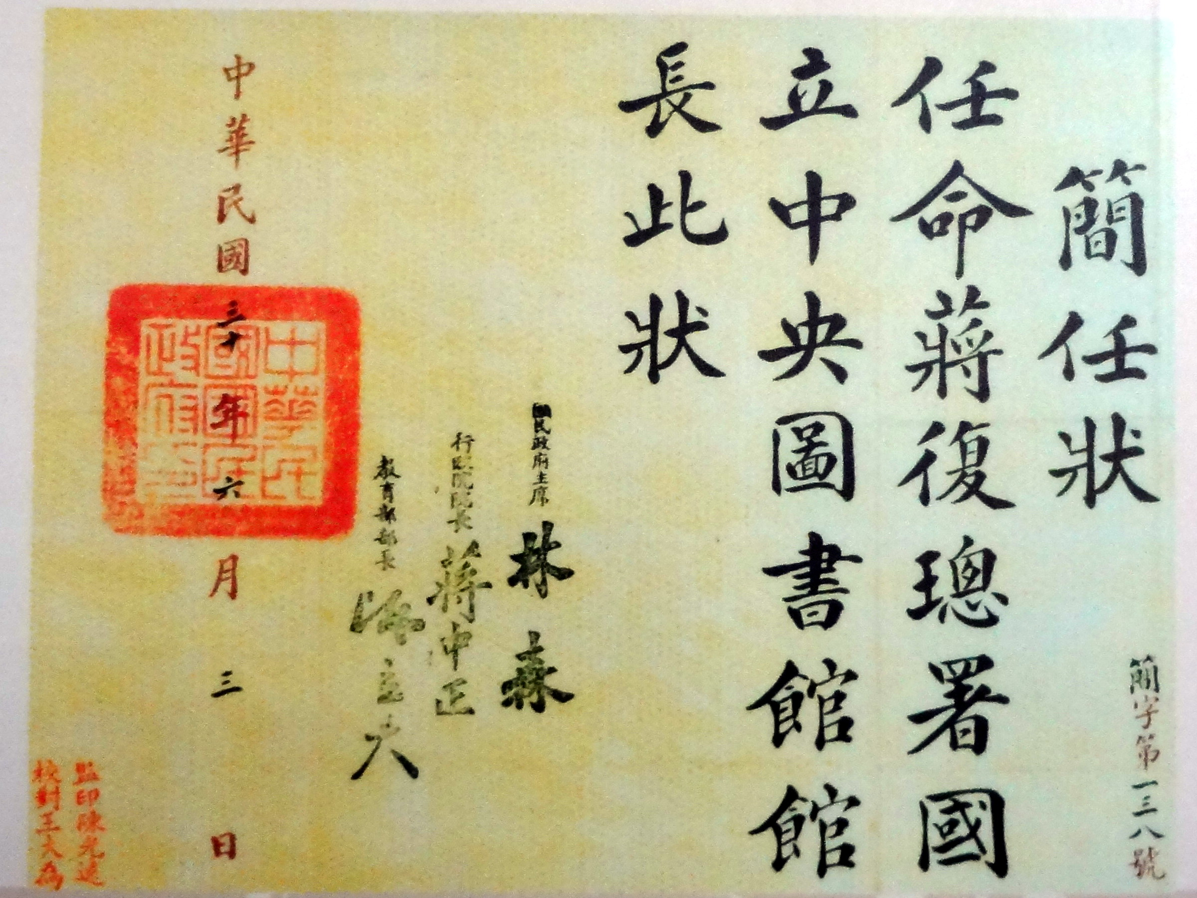 中文（台灣）: 1941年6月3日中華民國國民政府簡任狀，任命蔣復璁擔任國立中央圖書館館長。此為中華民國國家圖書館總館展示的數位掃描版。